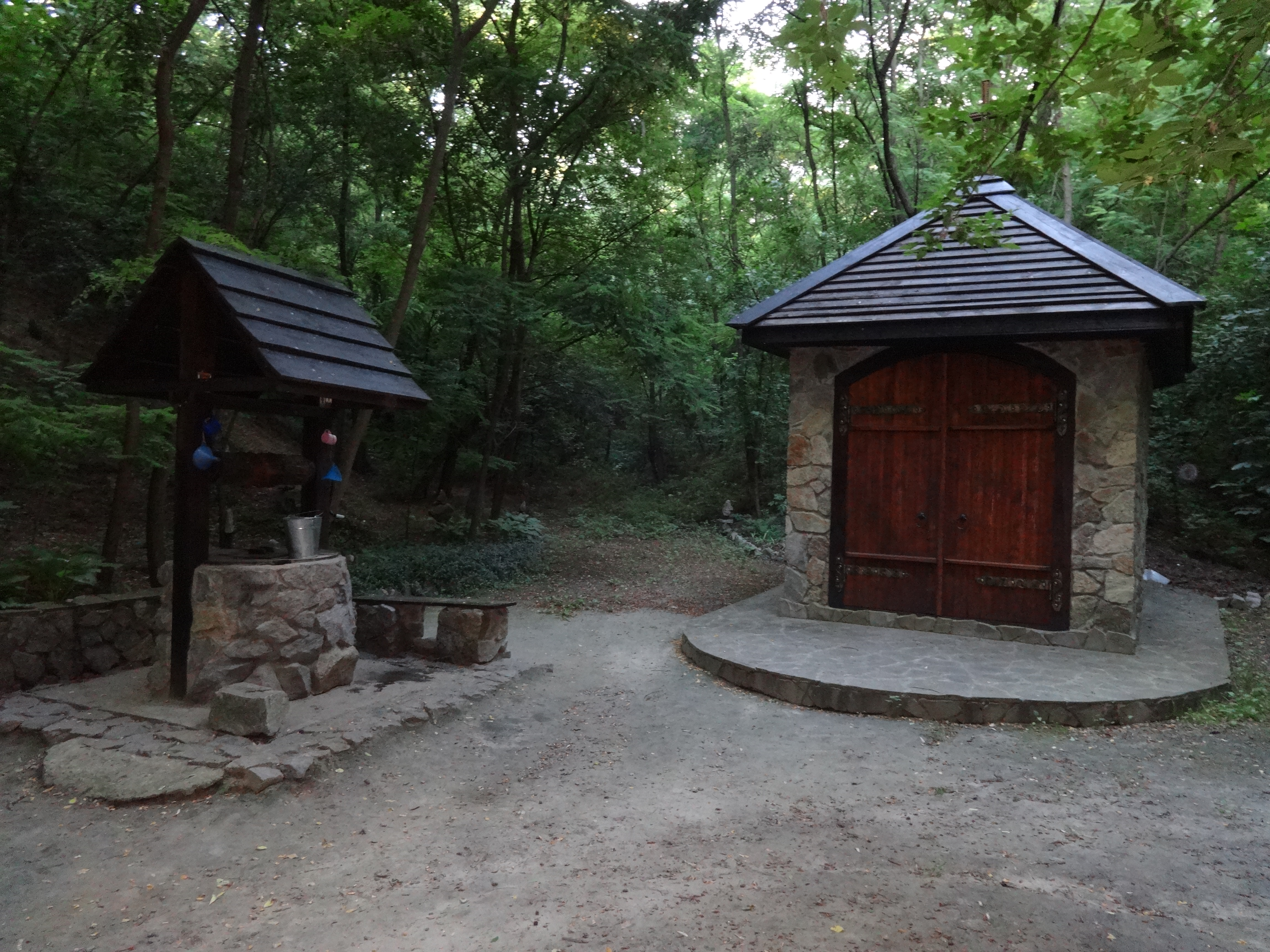 Пам'ятна капличка на місті Укріплень Української лінії у селі Рудка Царичанського району Дніпропетровщини